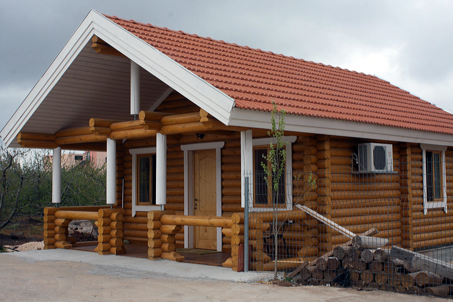 Циммер в деревне Буката, Израиль